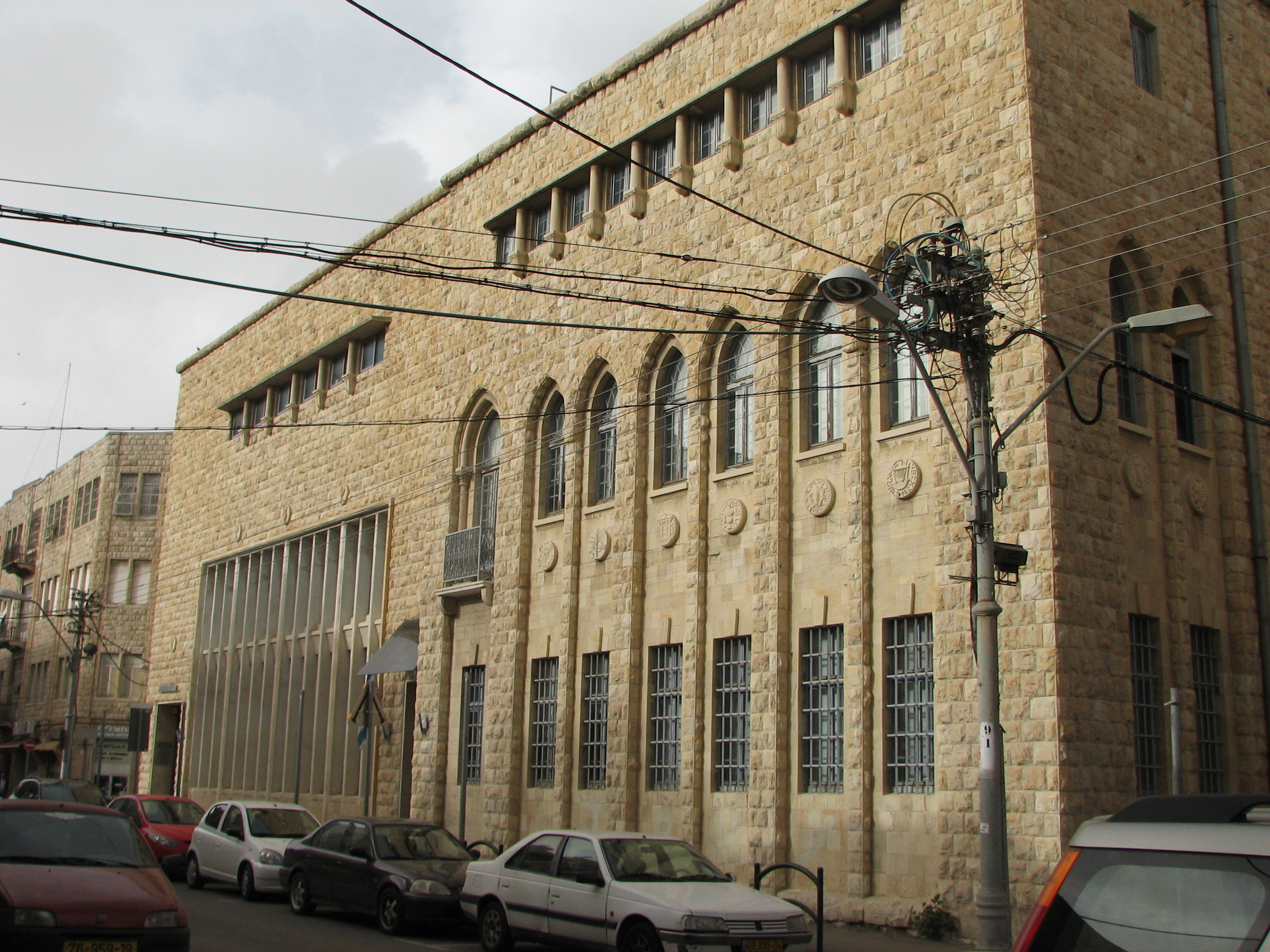 City Building, Haifa בני הסיטי בחיפה בעיר התחתית ברחוב נתנזון 1 לשעבר דרך יפו. נבנה ב-1925 כדי לשמש כסניף בחיפה של בנק אפ"ק. היום משמש כמבנה עסקים, שוכנת בו הקונסוליה של פורטוגל